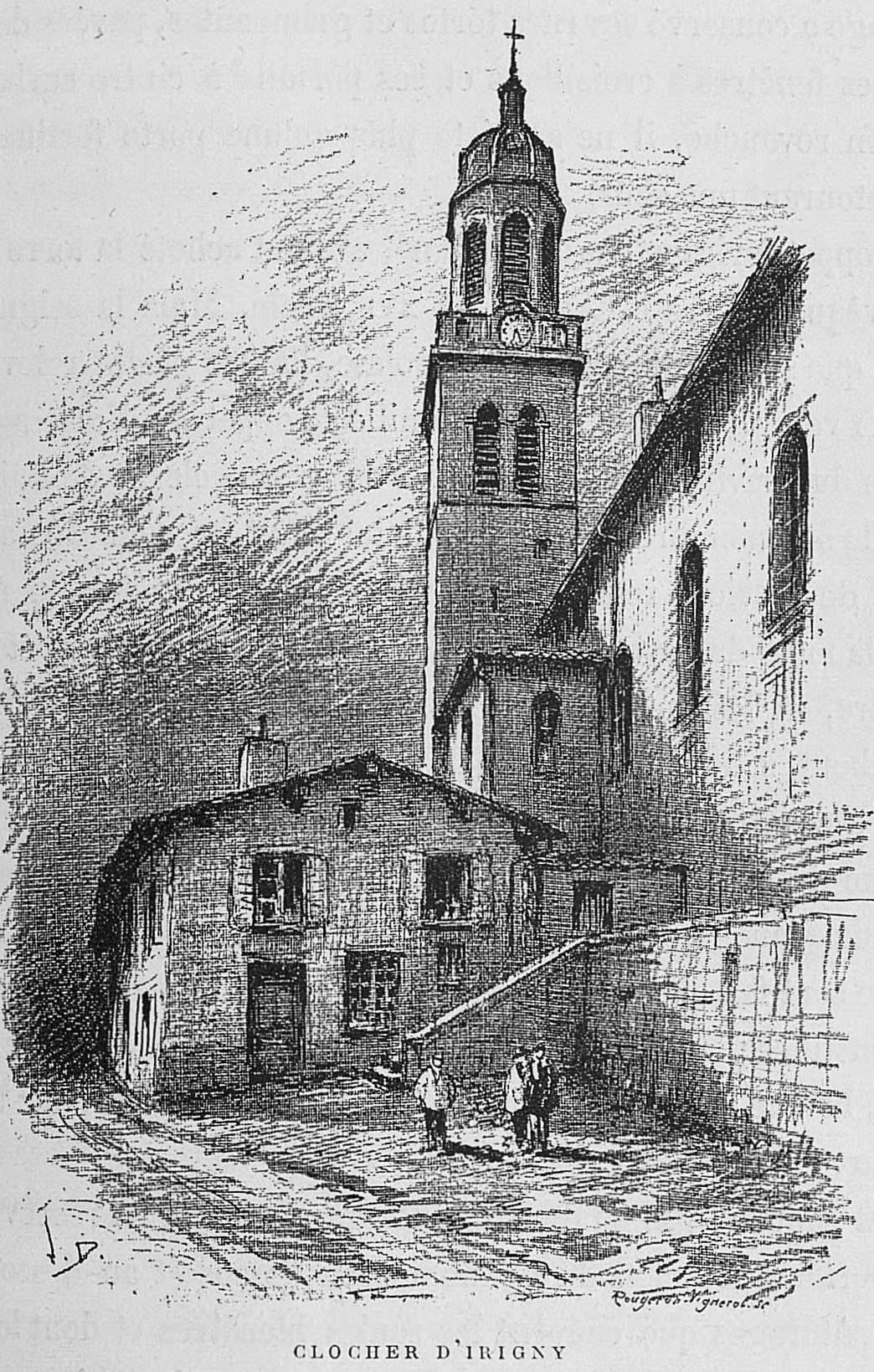 Aux environs de Lyon / Monsieur Josse ; préface de M. Coste-Labaume ; édition illustrée de 250 dessins de J. Drevet.